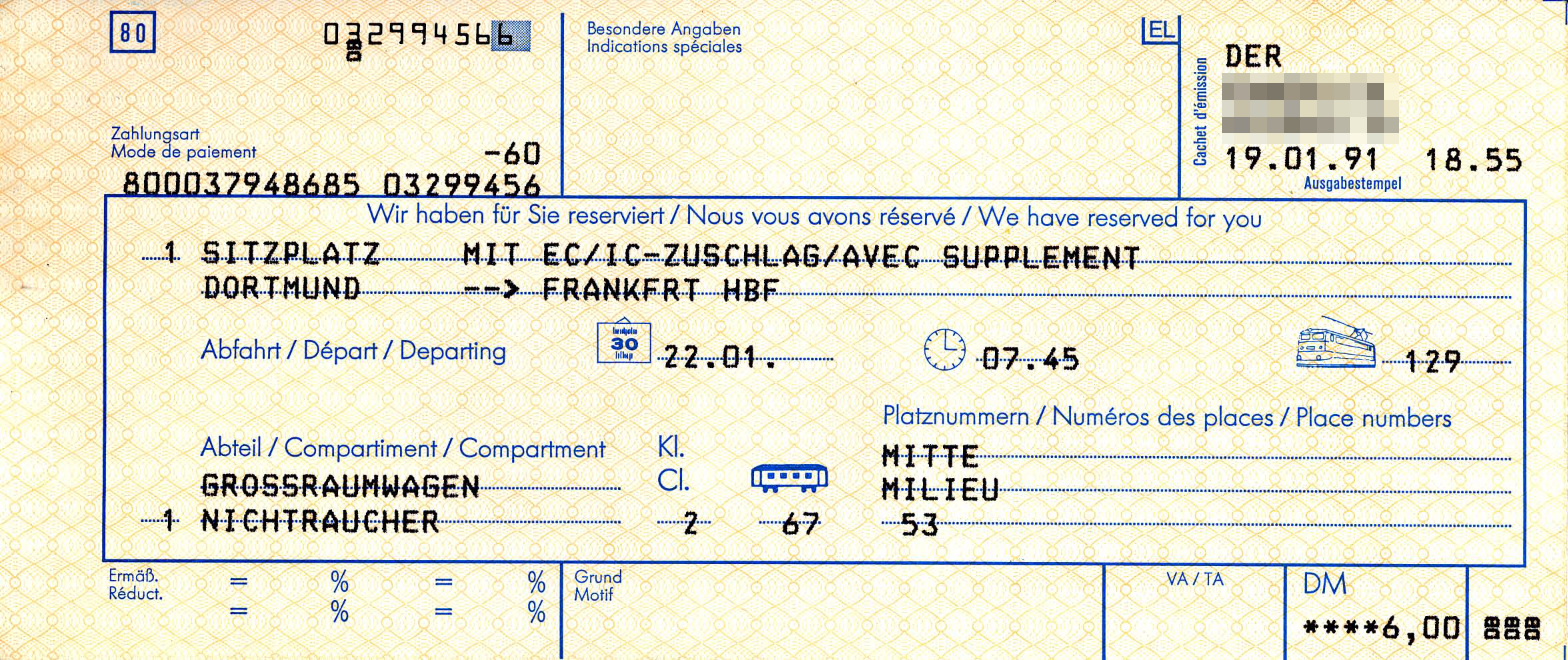 Sitzplatzreservierung inkl. EC/IC-Zuschlag Deutsche Bundesbahn für die Strecke Dortmund-Frankfurt Hbf